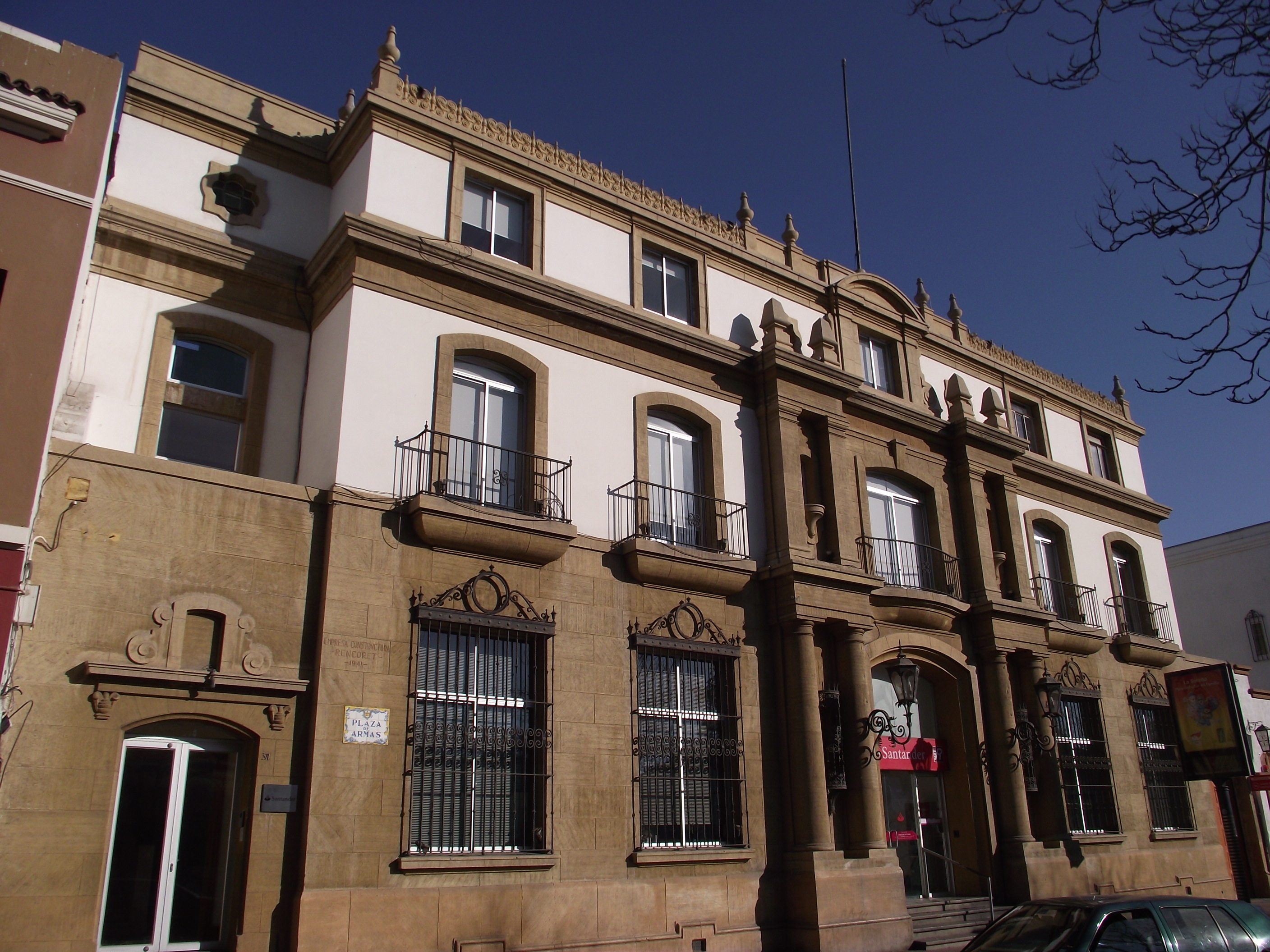 Sucursal del Banco Santander en La Serena.